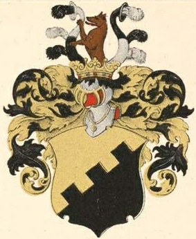 Lingeni suguvõsa aadlivapp